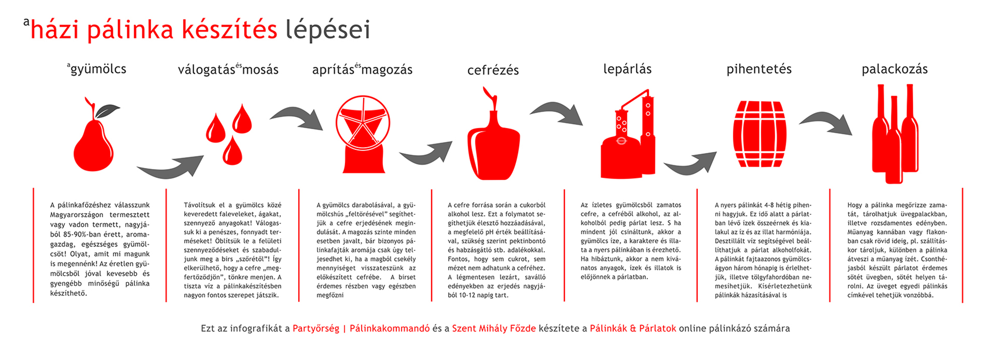 A házipálinka-főzés 7 fontos lépését foglalja össze az infografika, amit a Partyőrség | Pálinkakommandó készített.